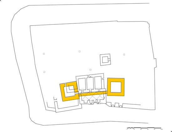 מבצר הונין - שני מגדלים הנמצאים ממערב וממזרח למבנה השער העות'מני ושנחפרו בחודשים ינואר-אפריל 1994 /צמד המגדלים המסומנים בצהוב, הם מהשרידים היחידים הידועים לנו כיום משלב הבניה הצלבני הראשון.